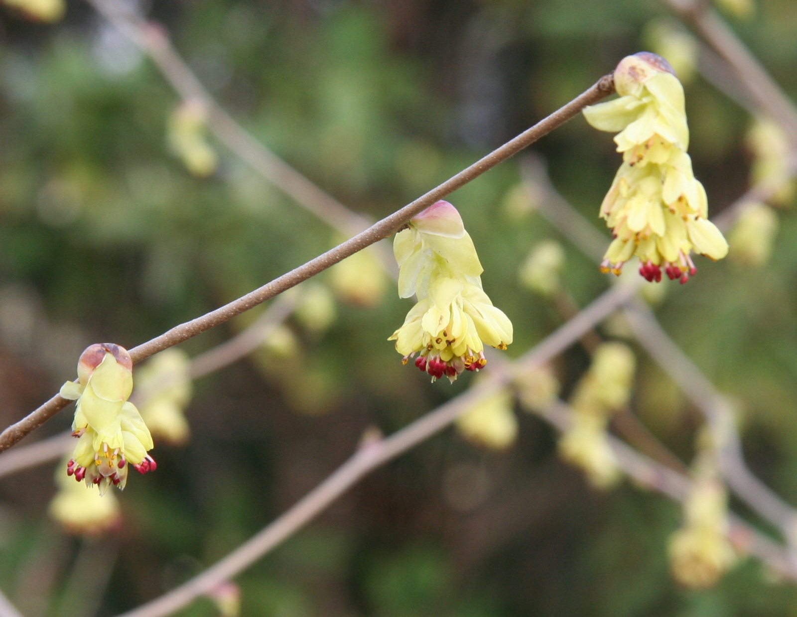 Corylopsis gotoana im Botanischen Garten Dresden